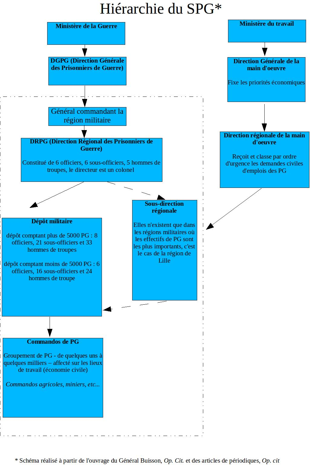 Source : Général Buisson, Historique du service des prisonniers de guerre de l’Axe, 1943-1948, Paris, ministère de la Défense nationale, 1948